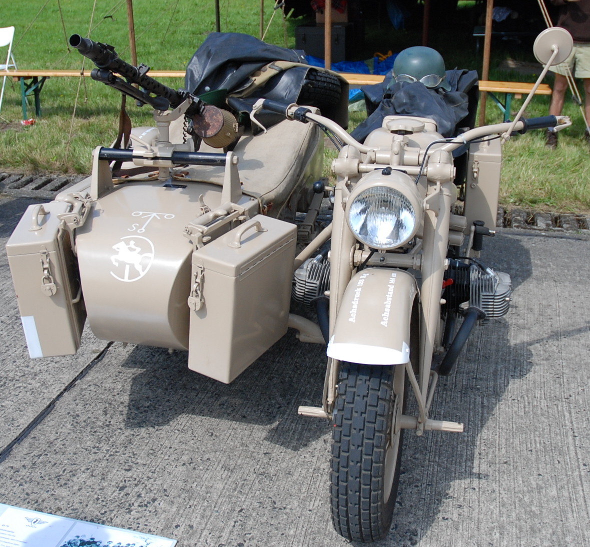 Zündapp KS 750 te Ursel, België